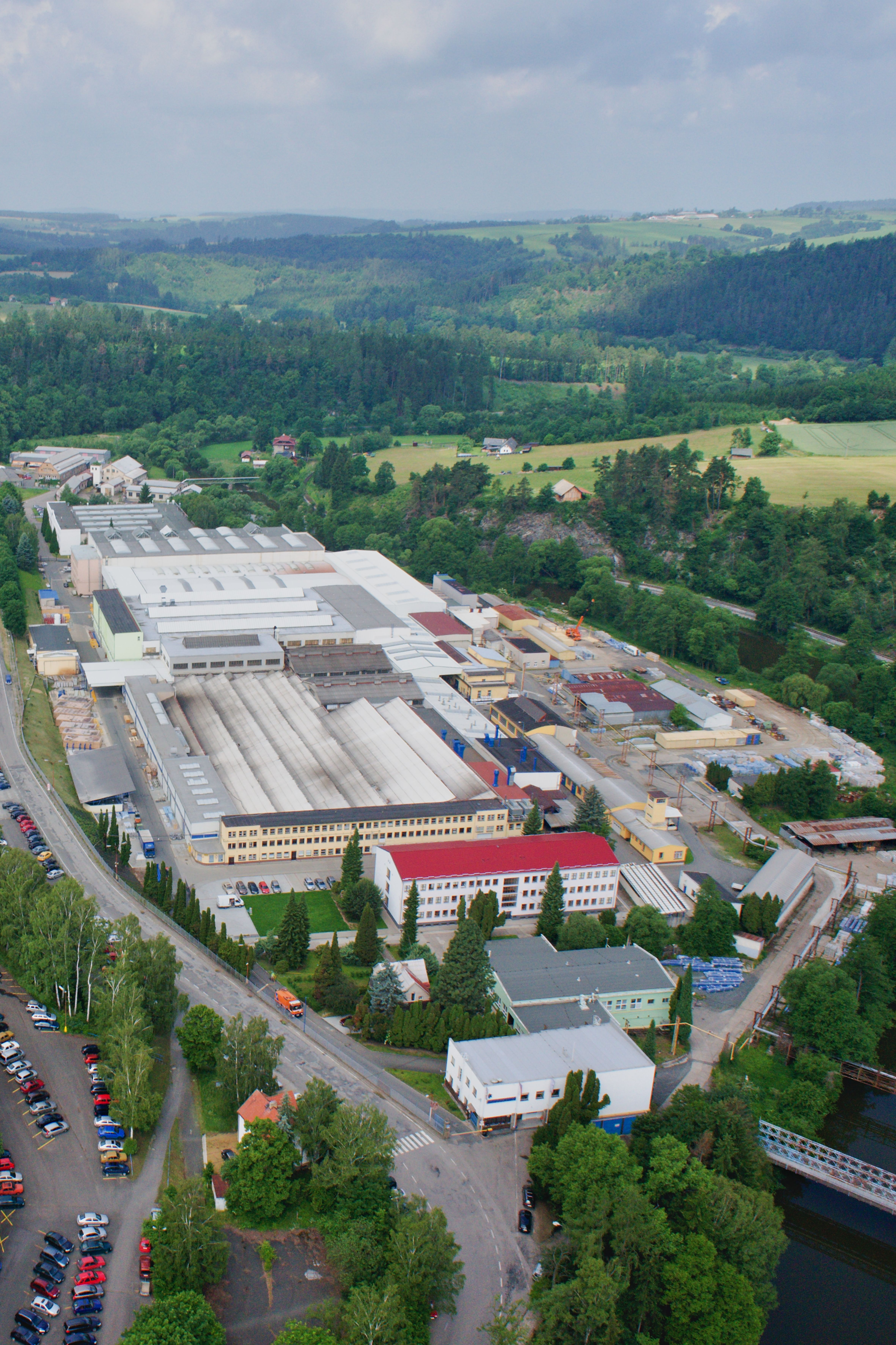 Letecký pohled na výrobní závod KOVOFINIŠ v Ledči nad Sázavou